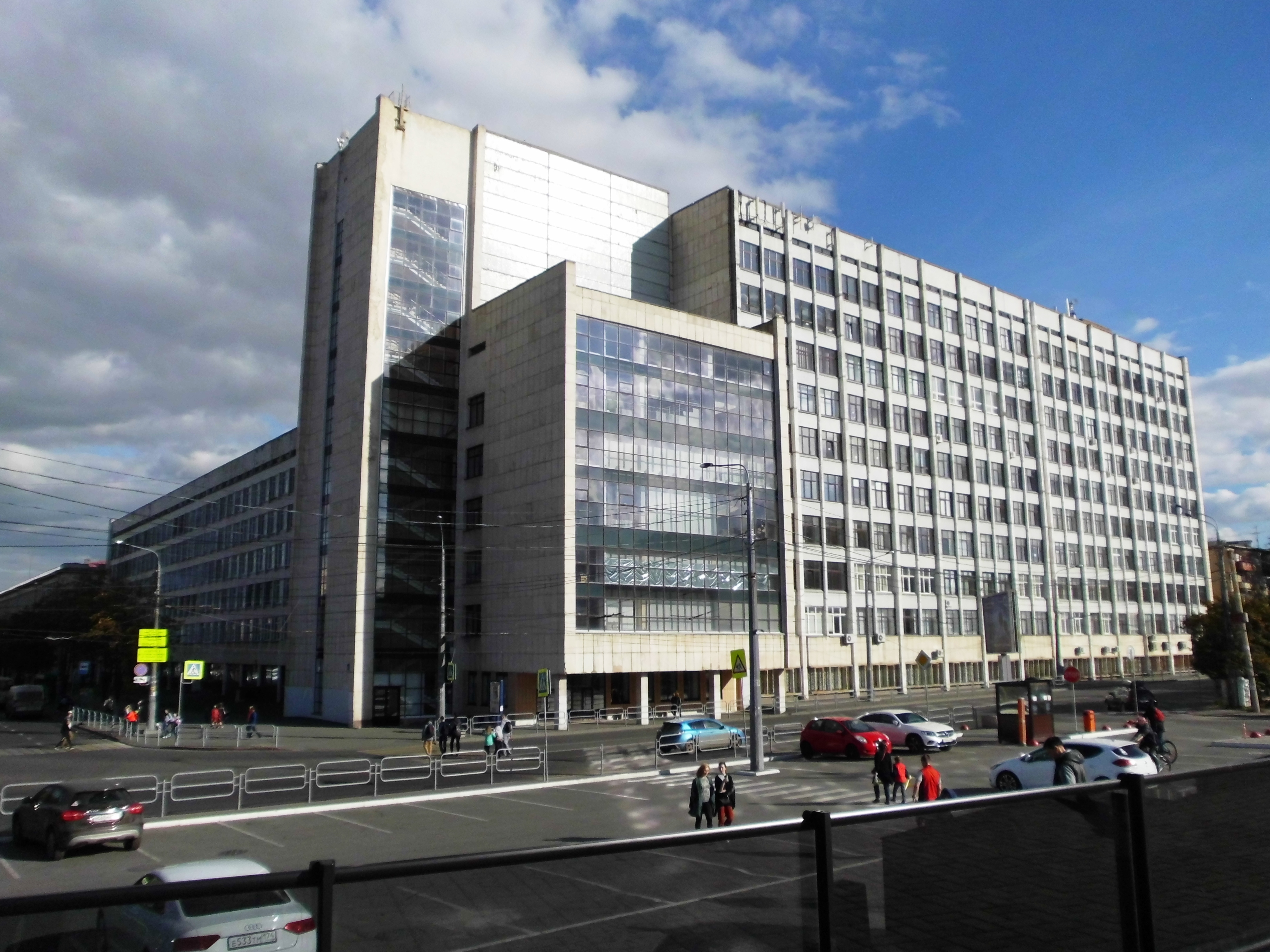 Учебные корпуса № 3А (слева), № 3Б (справа), № 3В (на углу здания) Южно-Уральского государственного университета (ЧГТУ, ЧПИ): проспект Ленина, 87, Челябинск, Челябинская область. Перекрёсток проспекта Ленина (слева) и улицы Лесопарковой (справа).